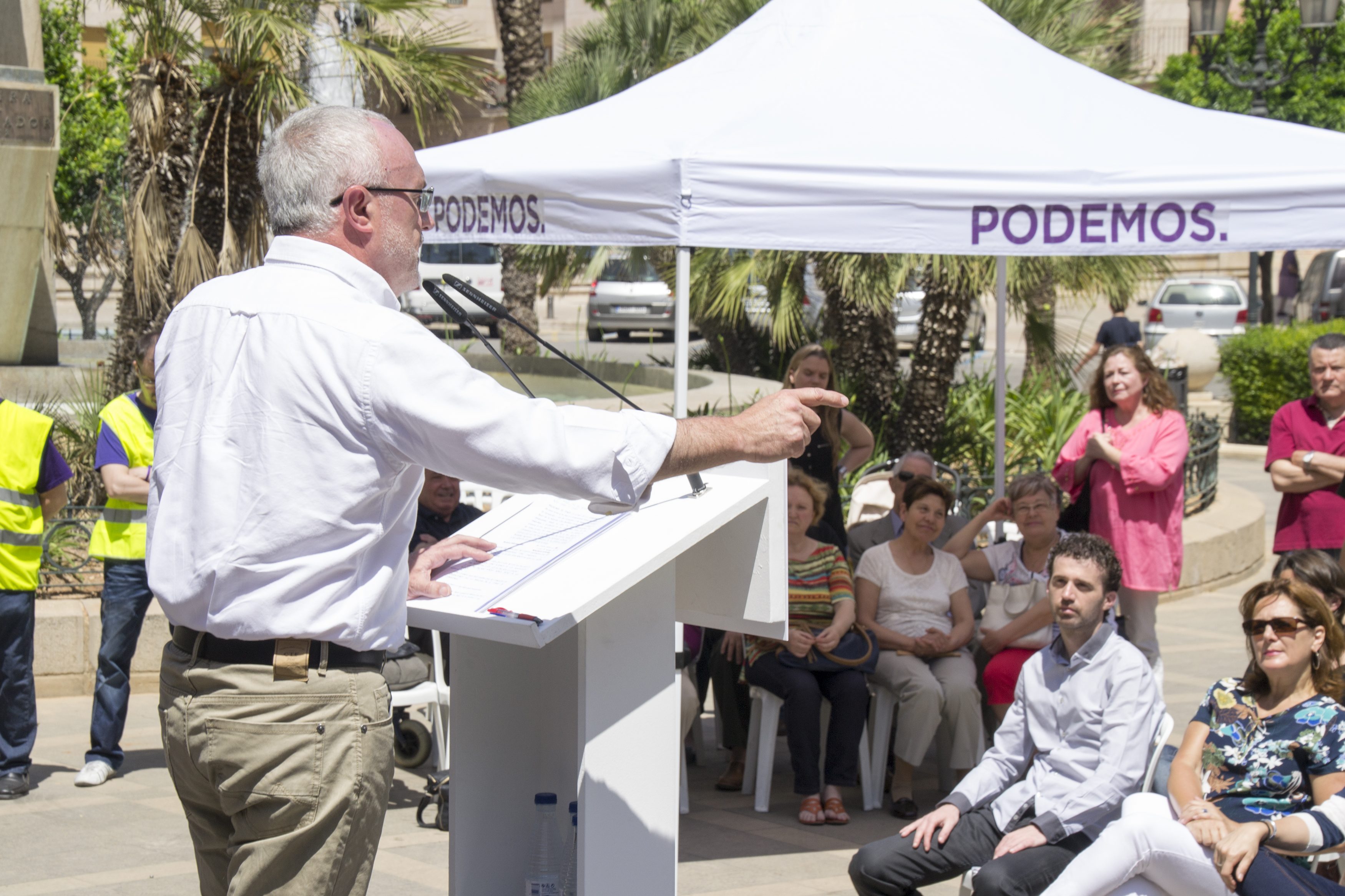 2015-05-10 Acte Electoral de Podem a Alzira